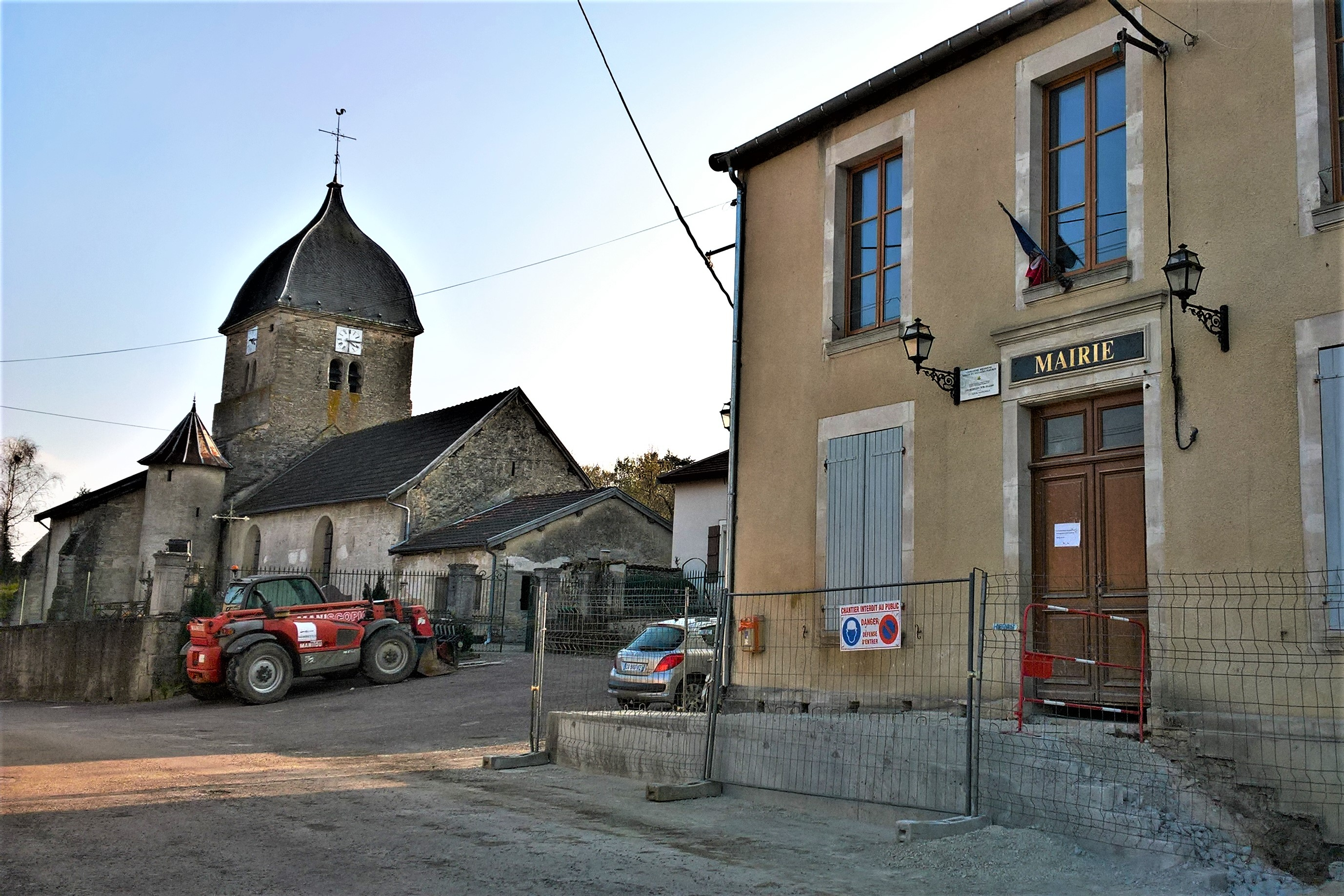 Courcelles-sur-Blaise, mairie, église